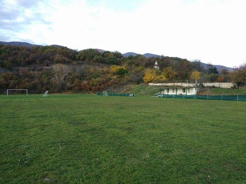 На снимката виждате спортното съоражение на Бенковски Црънча